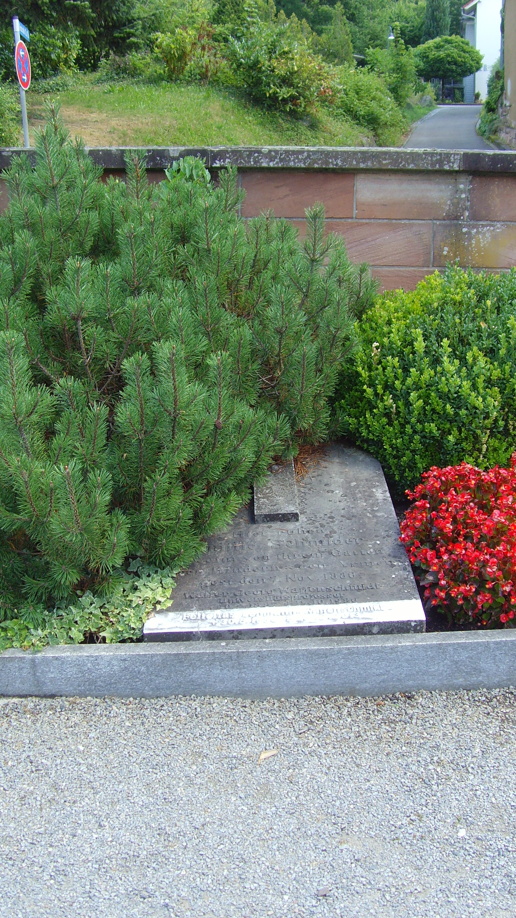 Grab auf dem Friedhof von Zell am Harmersbach